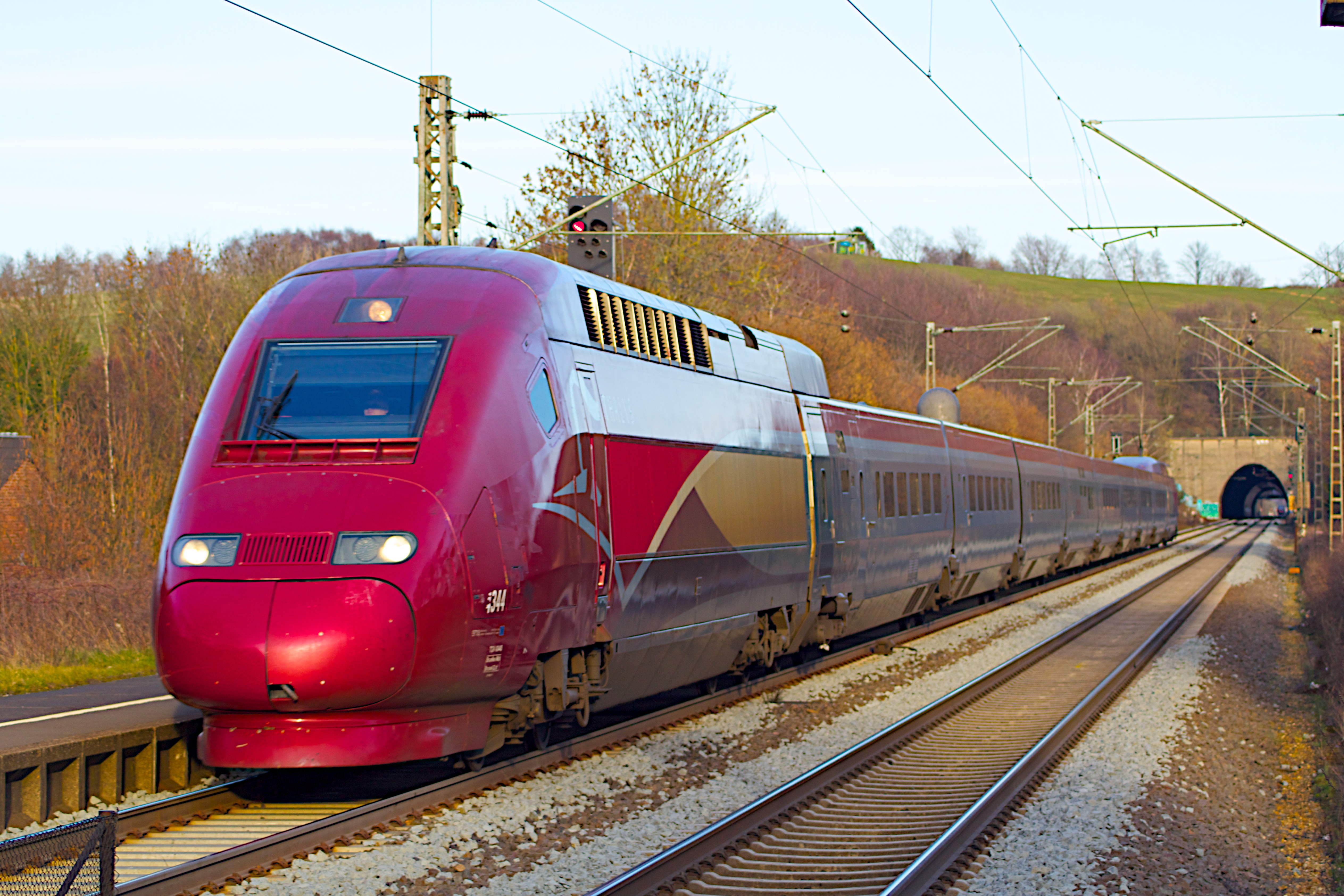 Thalys von Köln Hbf nach Paris Nord in Eilendorf.